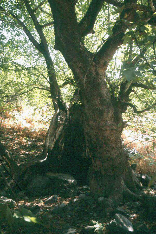 Alte geschneitelte Morgenländische Platane (Platanus orientalis) nahe Loutra, Samothrake